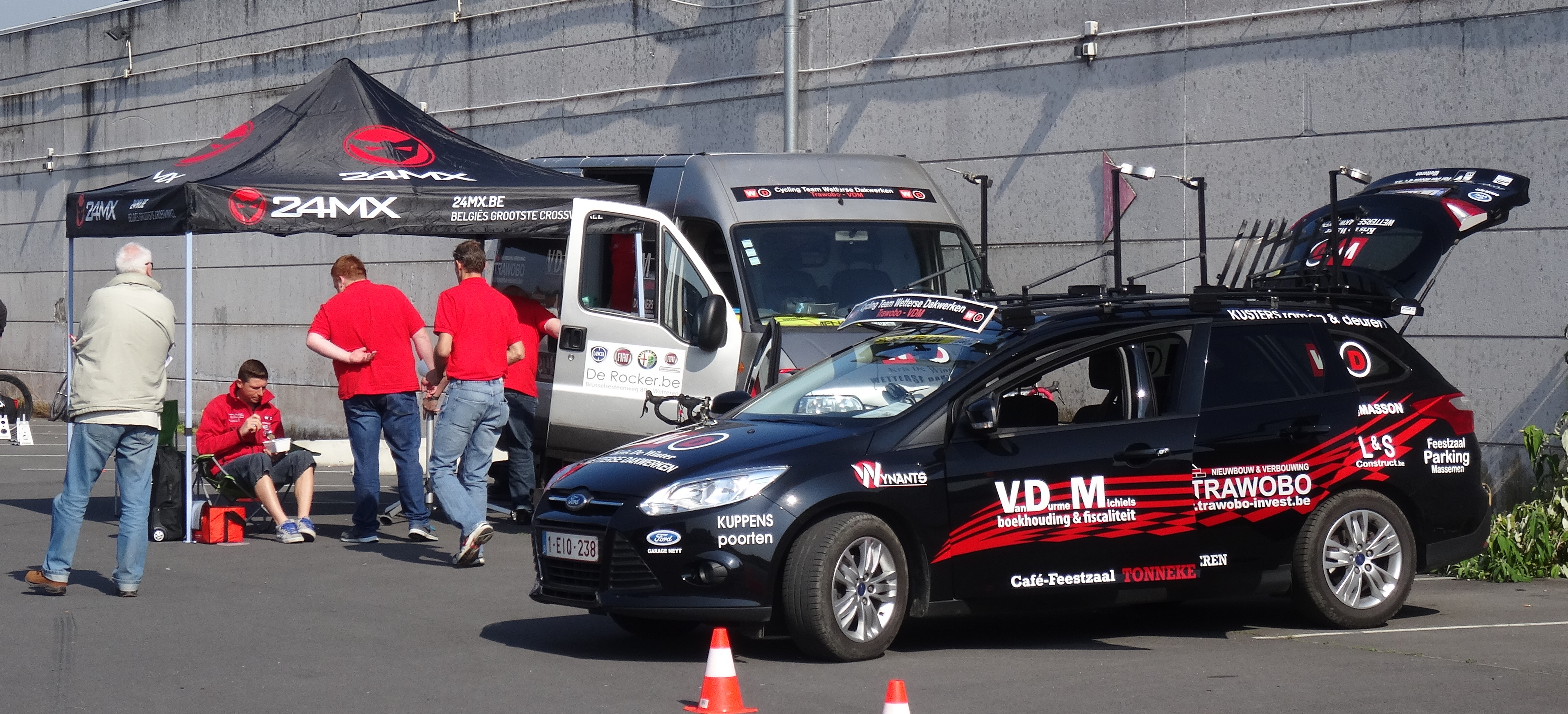 Reportage réalisé le samedi 17 mai à l'occasion du départ du Grand Prix Criquielion 2014 à Boussu, Belgique.